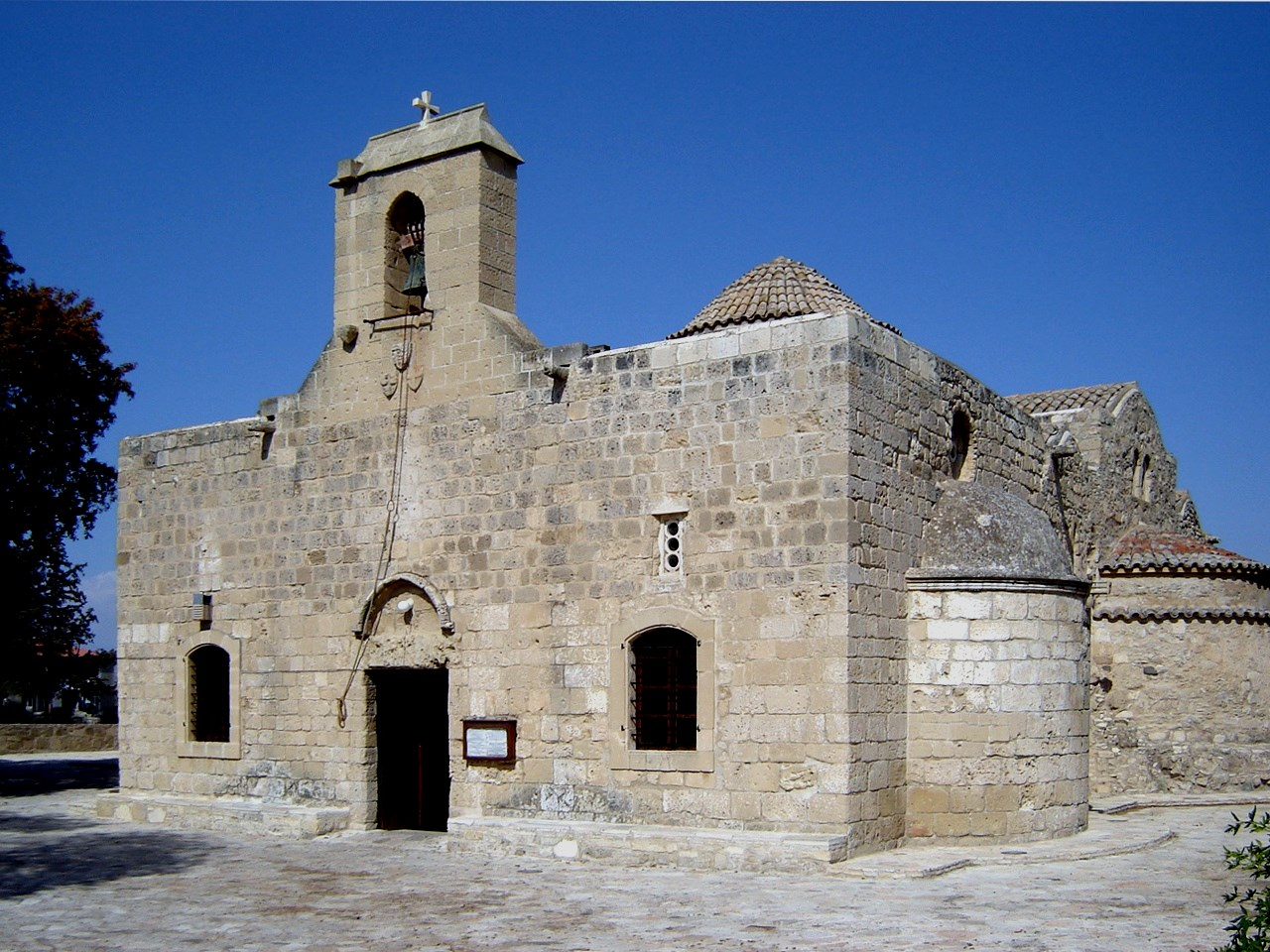 L'église Panagia Aggeloktisti à Kiti, Chypre.